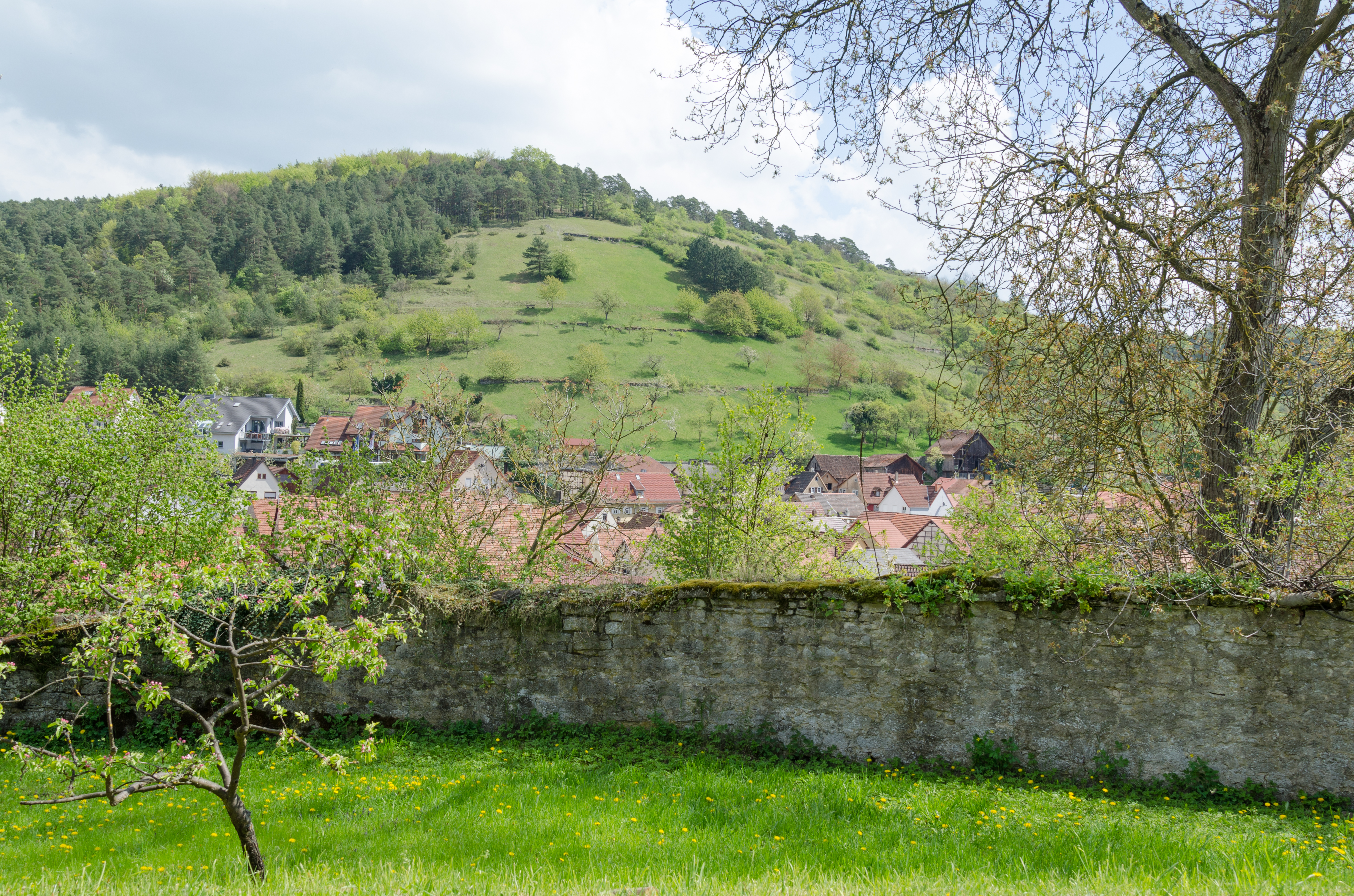 Sulzthal, Ortsmauer, Ermsthaler Straße